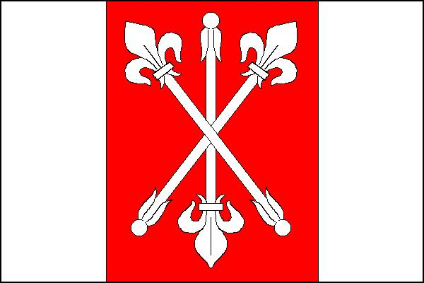 Vlajka obce Litenčice